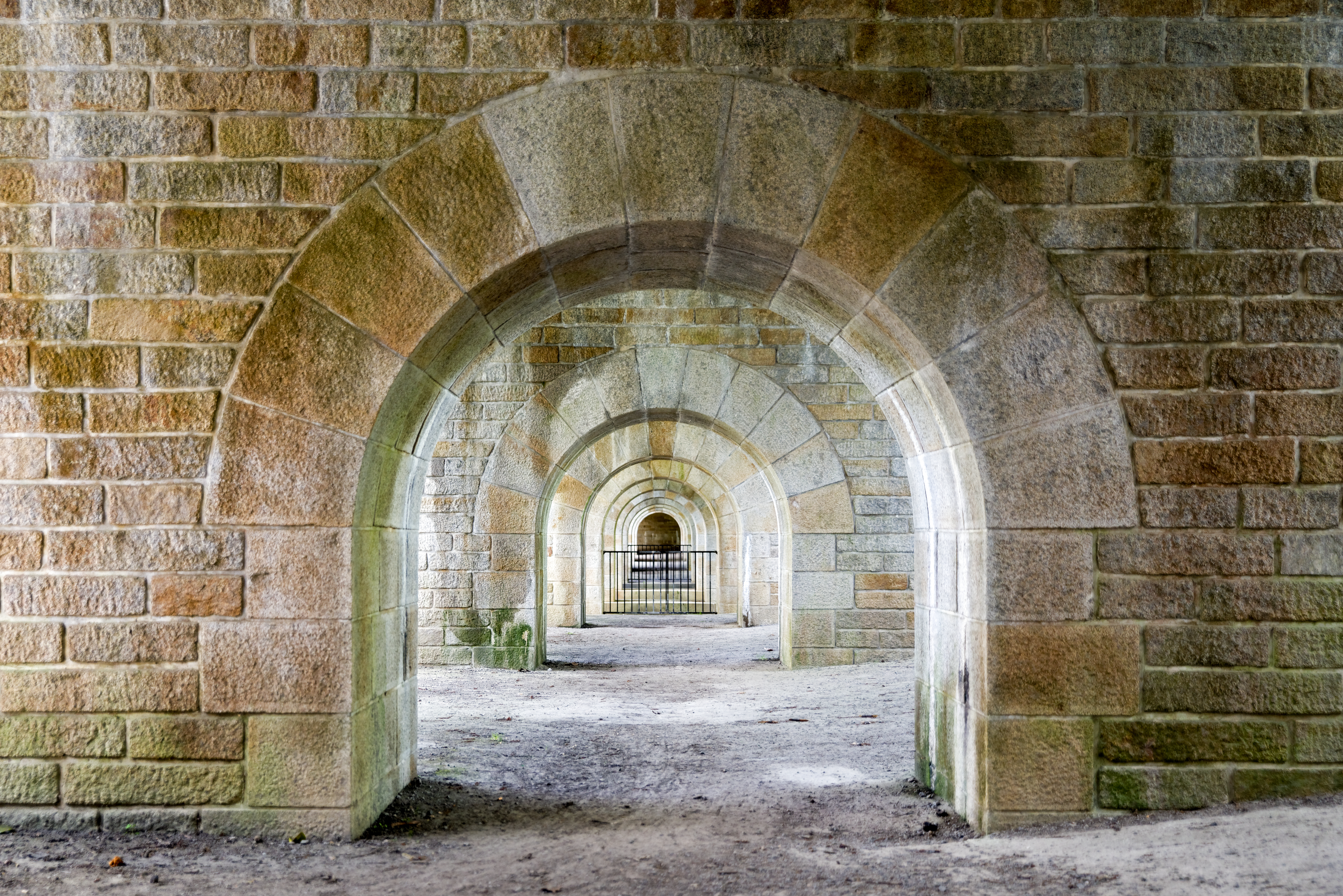 Arches sous le pont Jules-César, aux limites du parc de Procé. (Nantes, Loire-Atlantique, Pays de la Loire, France)